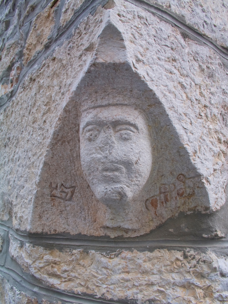 Maskeron (muška glava) iz 1738. godine u Dobrinju na otoku Krku